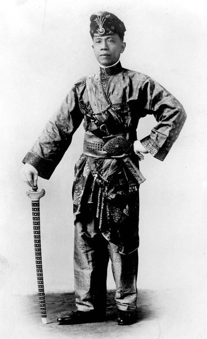 Repronegatief. Portret van de Sultan van Serdang, vermoedelijk Oost-Sumatra